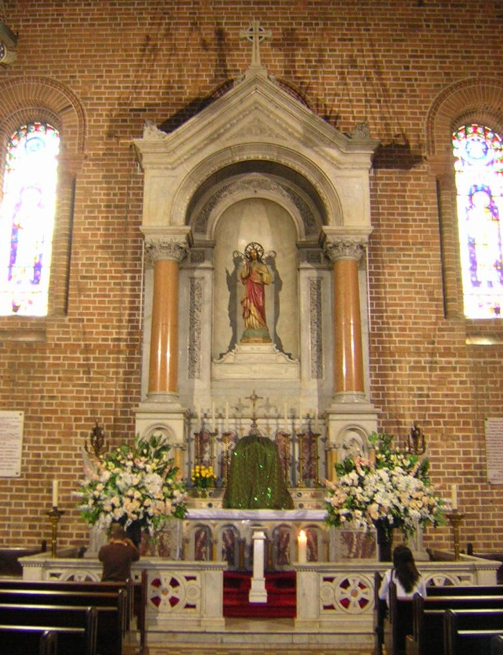 Retablo del costado oriental del transepto de la Catedral Metropolitana de Medellín, en el está colocado el Sagrario y la imagen del Corazón de Jesús.